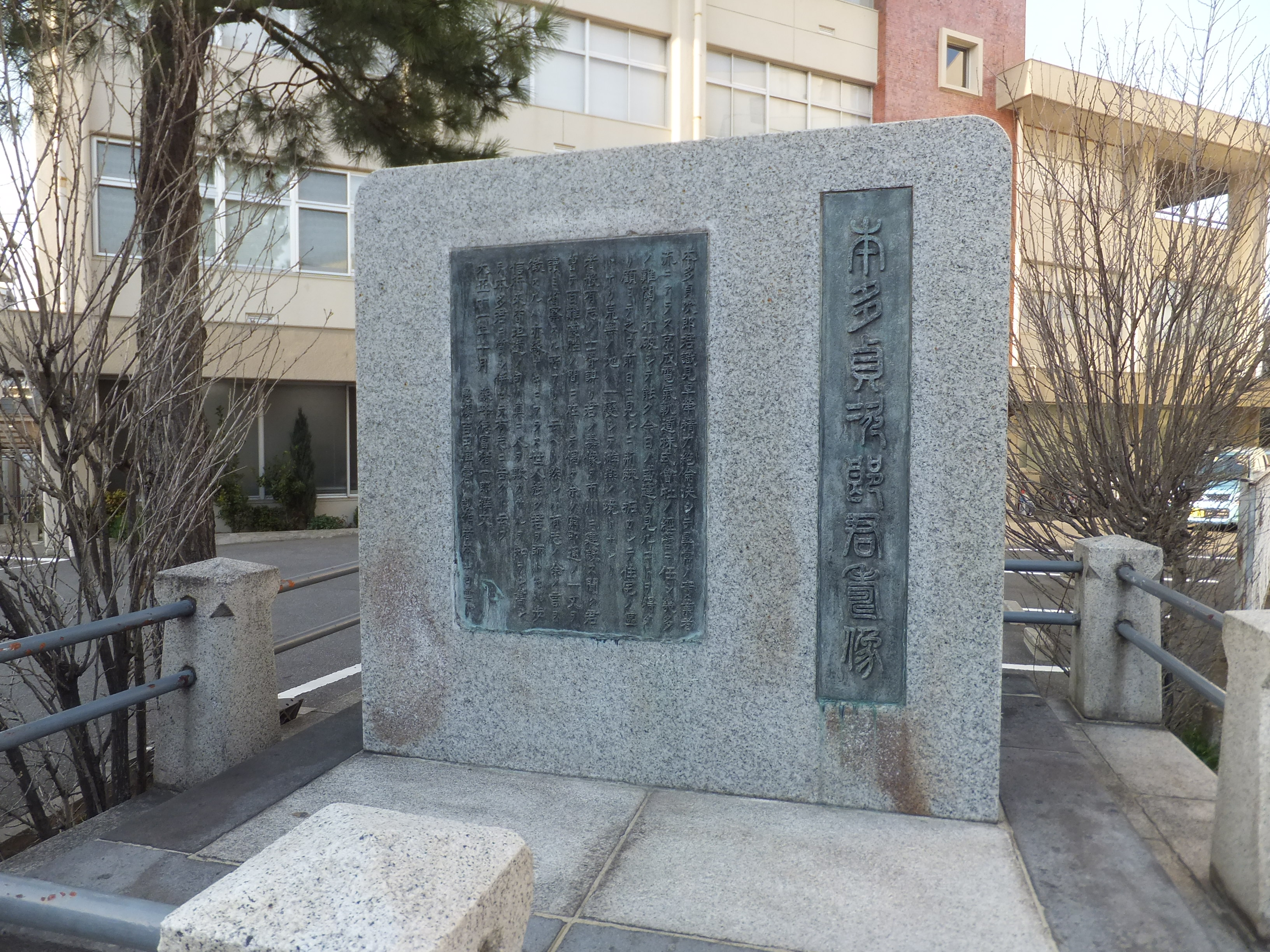 市川真間駅すぐ近くにある京成電鉄初代社長本多貞次郎頌徳碑